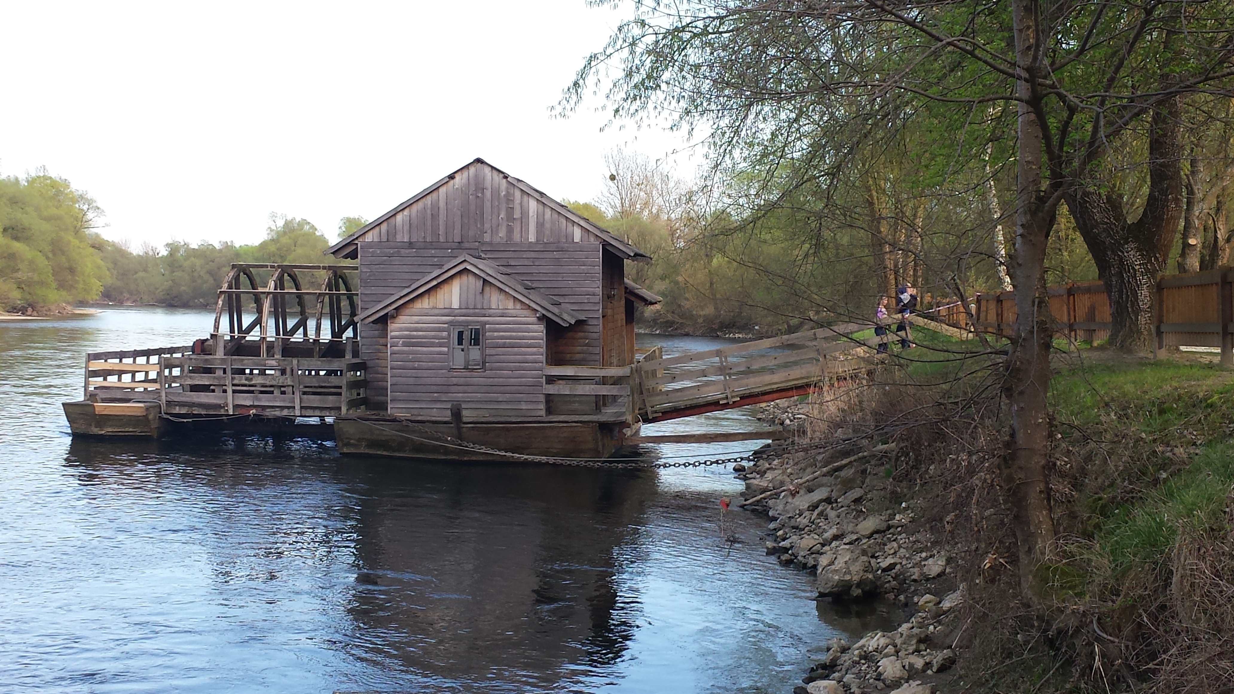 Sveti Martin na Muri, Hrvaška, Mlin na Muri.